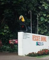 Entrada principal al Rescate Animal Zoo Ave, La Garita, Costa Rica